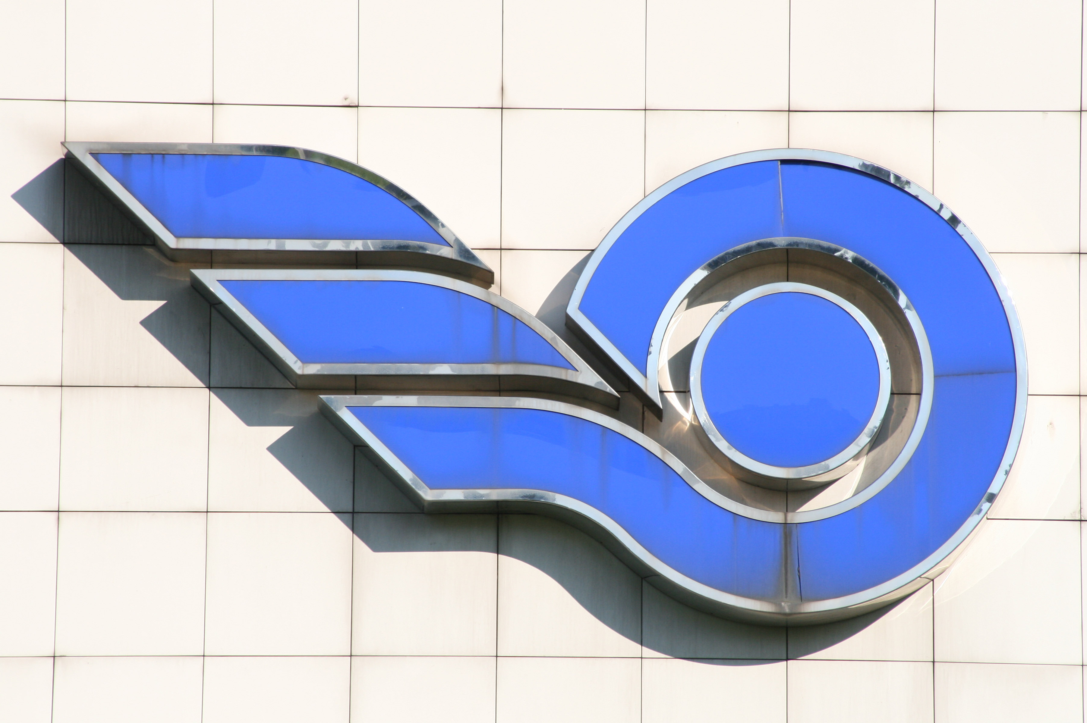 Logo Železnica Slovenskej republiky